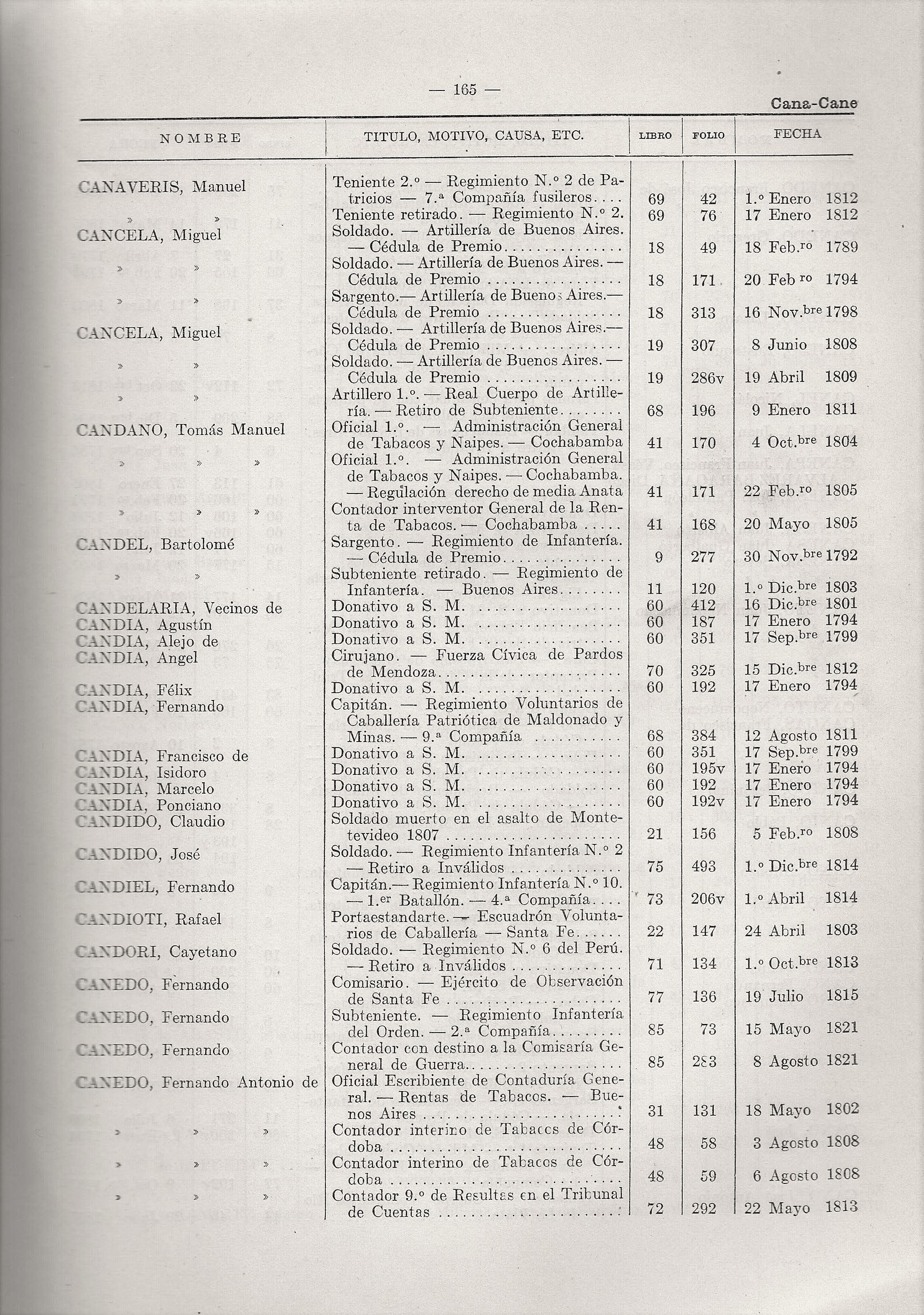 Tomas de razón de despachos militares, cédulas de premio, retiros, empleos civiles y eclesiásticos, donativos, etc. : 1740 a1821 (Letra C continuación)